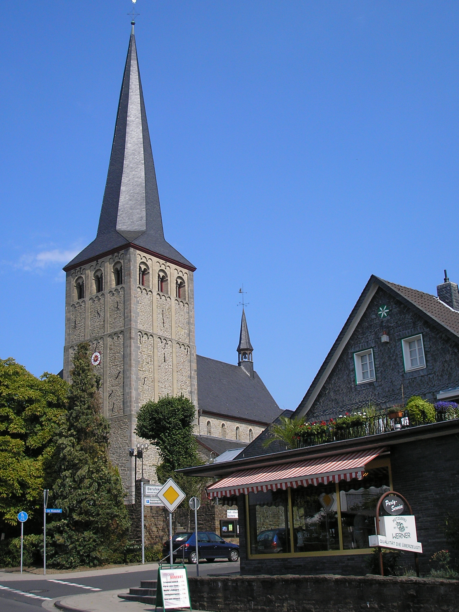 Neunkirchen, Kath. Pfarrkirche St. Margareta, Blick von der Hauptstrasse